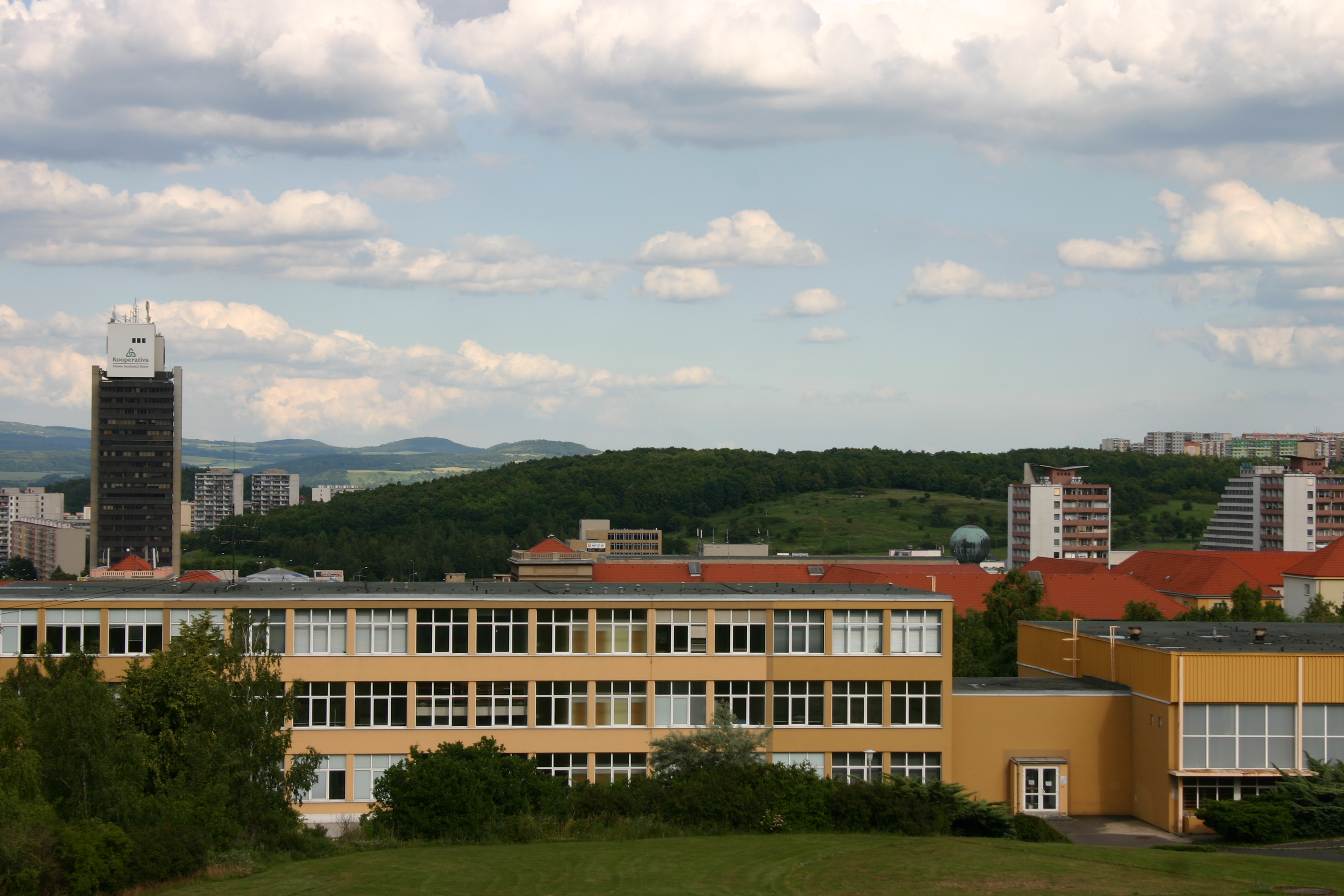 Park Šibeník v Mostě, v popředí střední zdravotnická škola